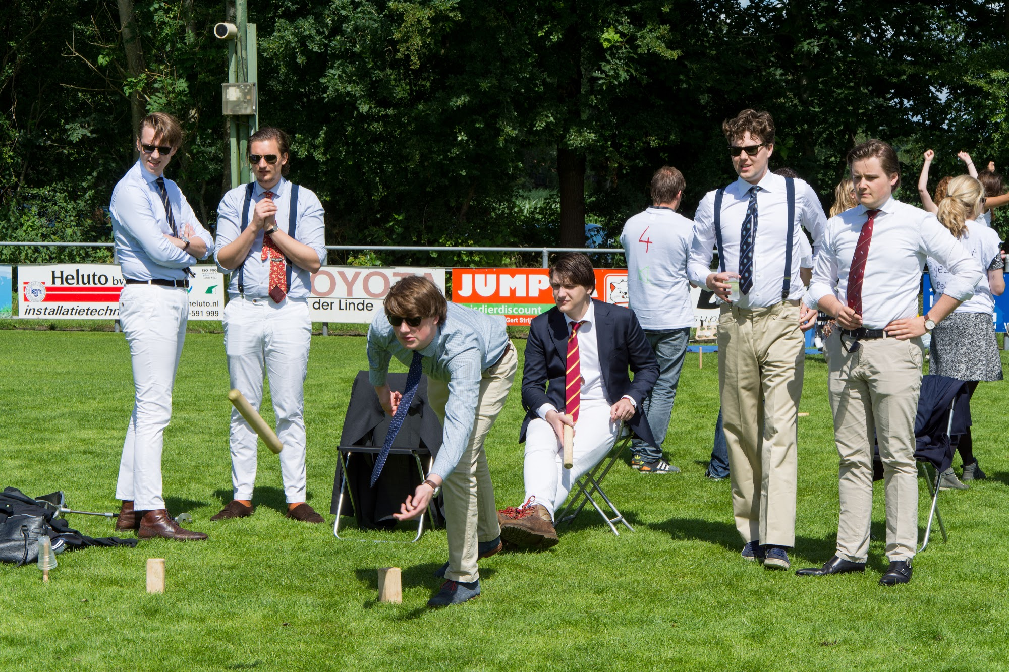 Nederlands Kubb team NK Kubb